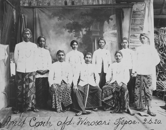 Foto. Groepsportret van ambtenaren van de controle afdeling Wirosari, Tjepoe